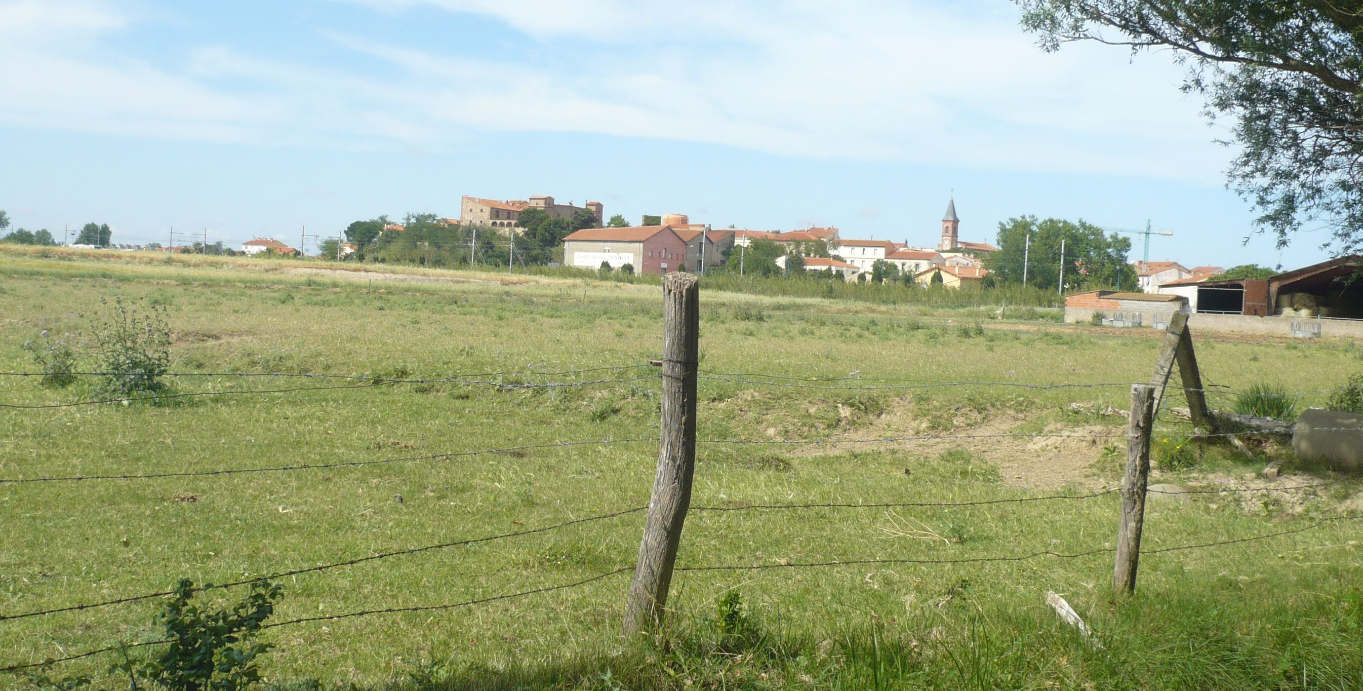 Vue générale de Corneilla-del-Vercol